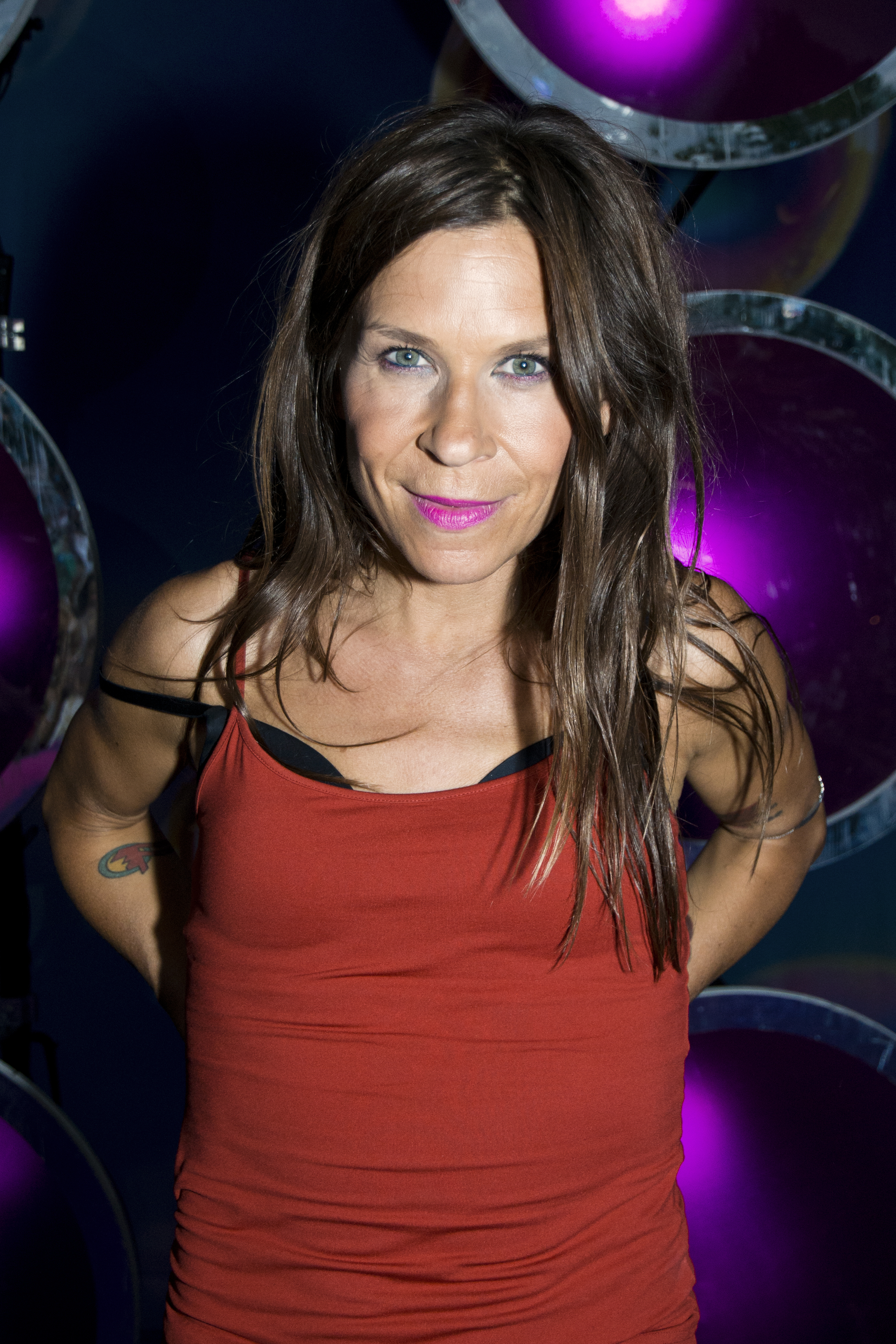 Caroline af Ugglas på Sommarkrysset, Gröna Lund i Stockholm